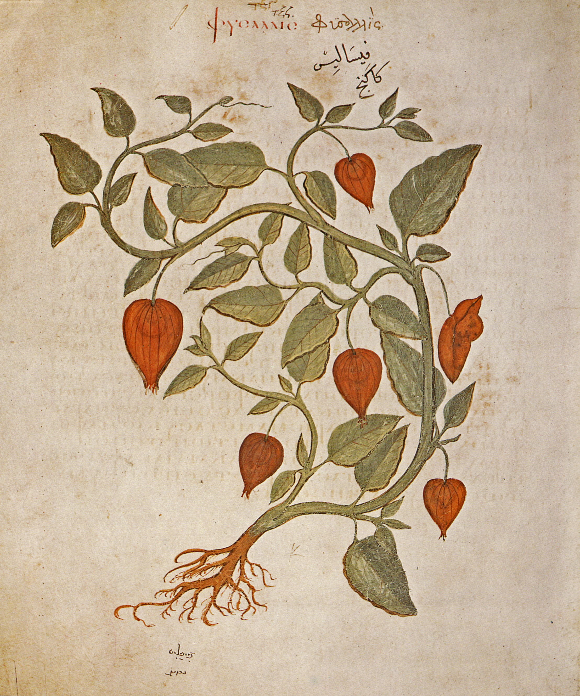 Eine Judenkirsche (Physalis Alkekengi L., Fam. Solanaceae) oder Schlafmachende Schlutte (Physalis somnifera L.). Pflanzenbild aus dem Wiener Dioskurides, fol. 359 verso